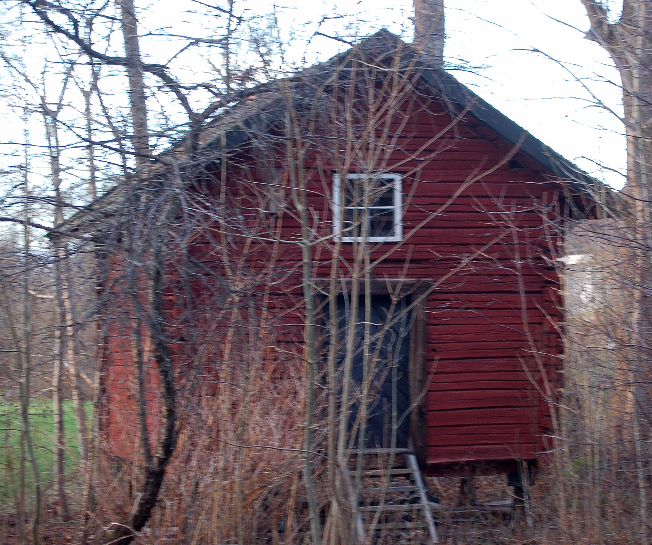 Loftbod Nytomta.